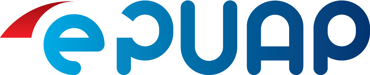 Logotyp systemu ePUAP